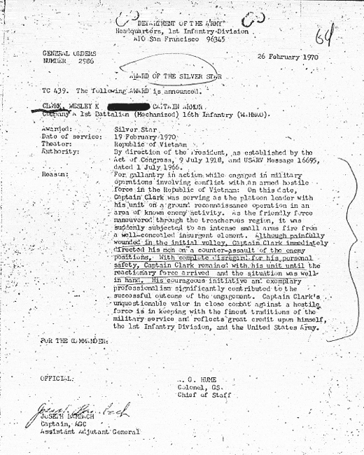 Наградной лист на орден Серебряная Звезда